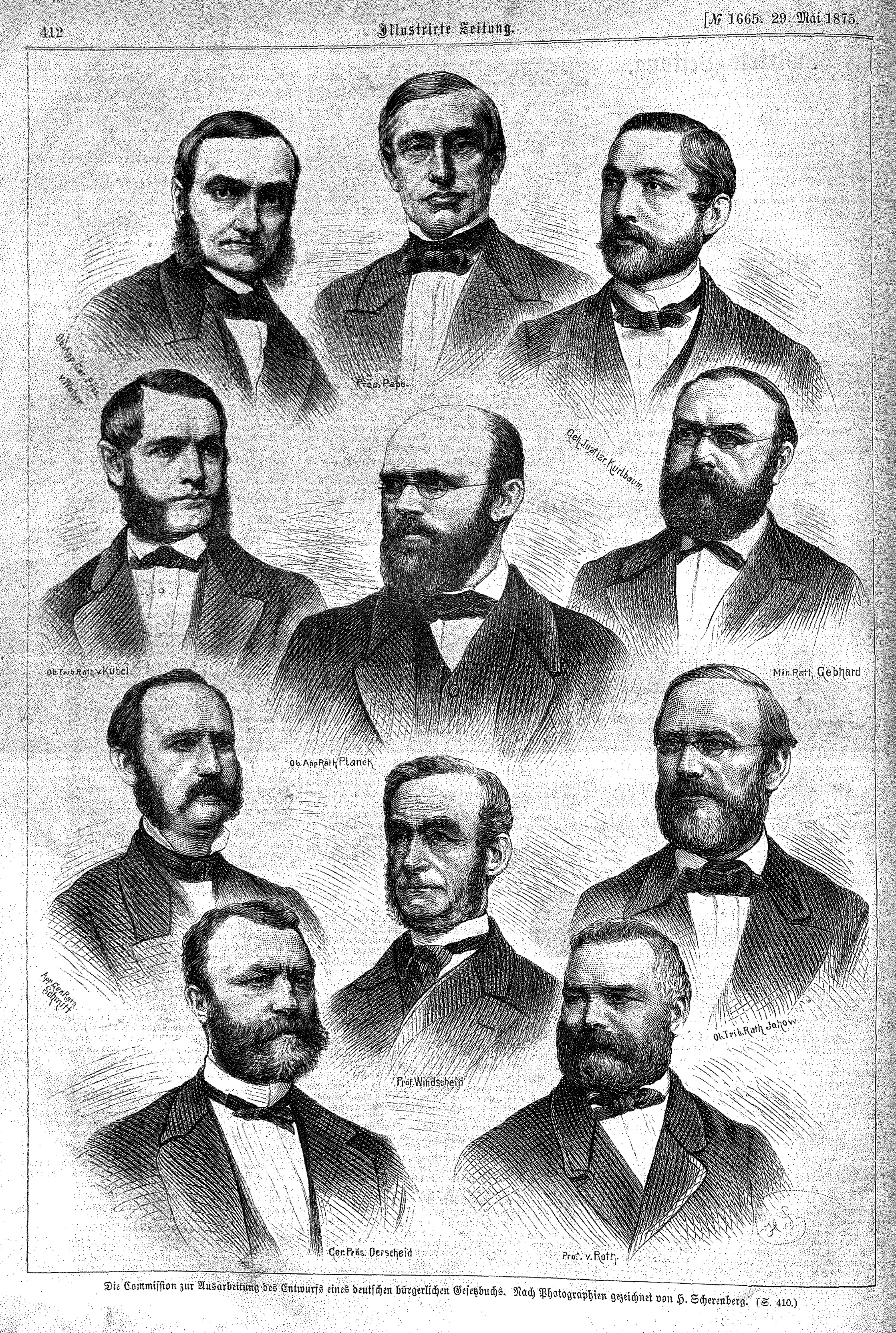 Die Commission zur Ausarbeitung des Entwurfs eines deutschen bürgerlichen Gesetzbuchs